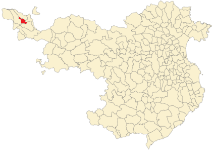 Situación de Bolvir en la provincia de Gerona.